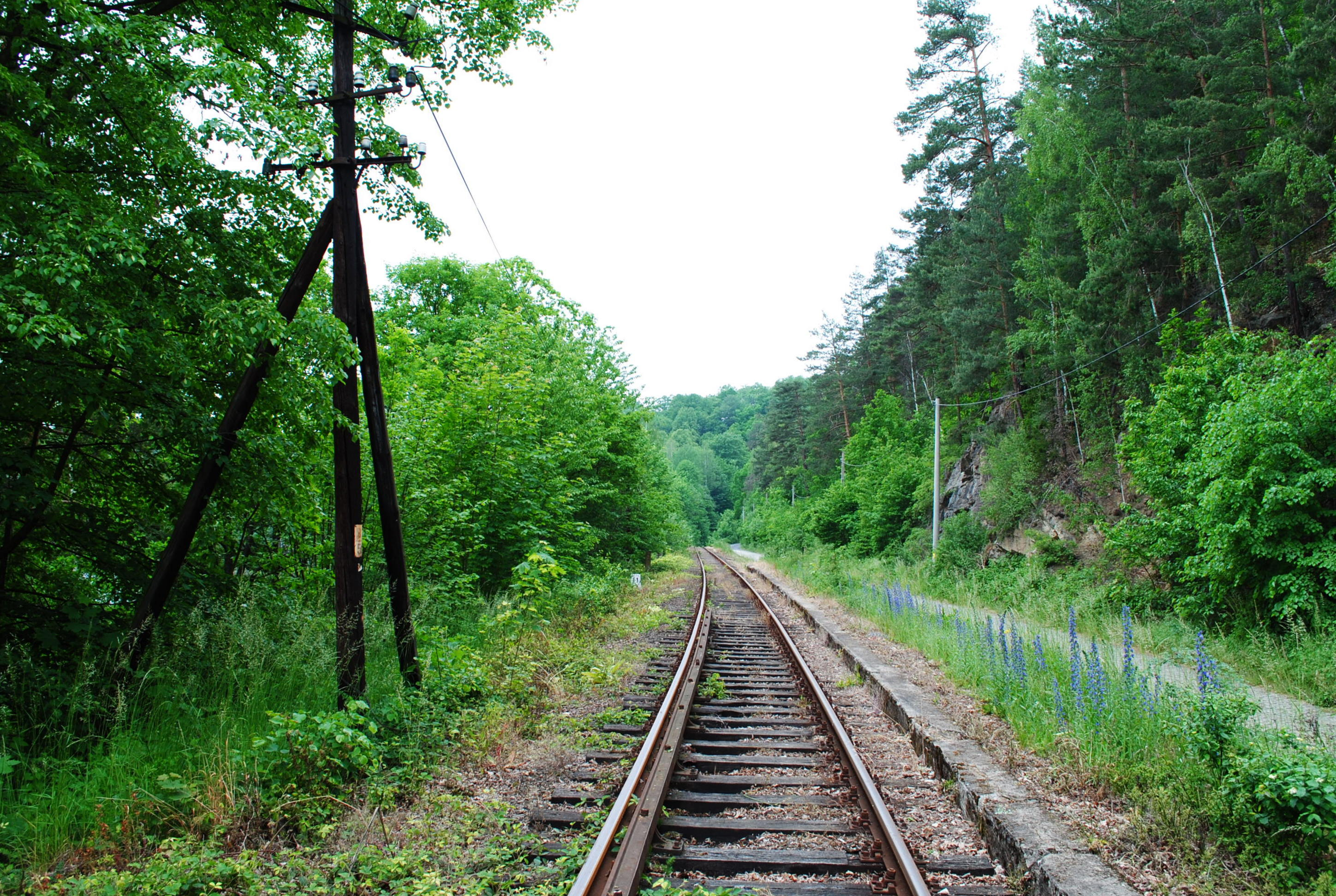 Linia kolejowa nr 283. Okolice przystanku Pilchowice Zapora (widok w stronę Lwówka Śląskiego)